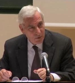 Carlo Ossola, professeur au Collège de France, titulaire de la chaire de Littératures modernes de l'Europe néolatine